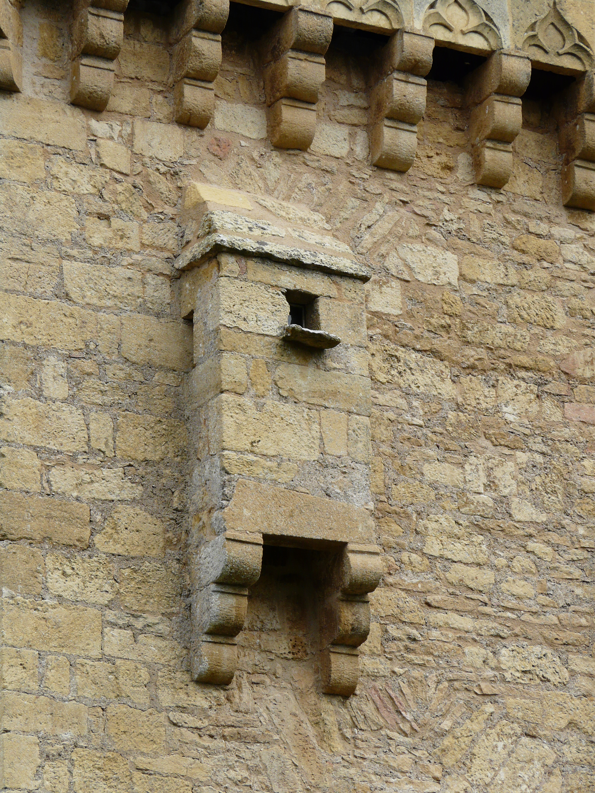 Latrines du manoir de la Salle, Saint-Léon-sur-Vézère, Dordogne, France. This building is en partie classé, en partie inscrit au titre des Monuments Historiques. .